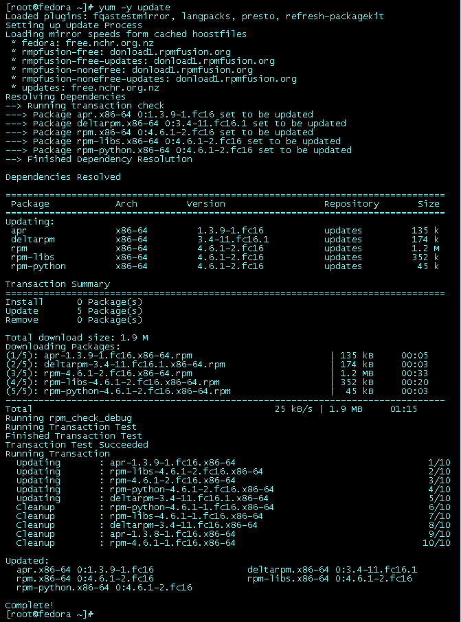 Yellowdog Updater spielt Updates auf einem Fedora 16-System ein.